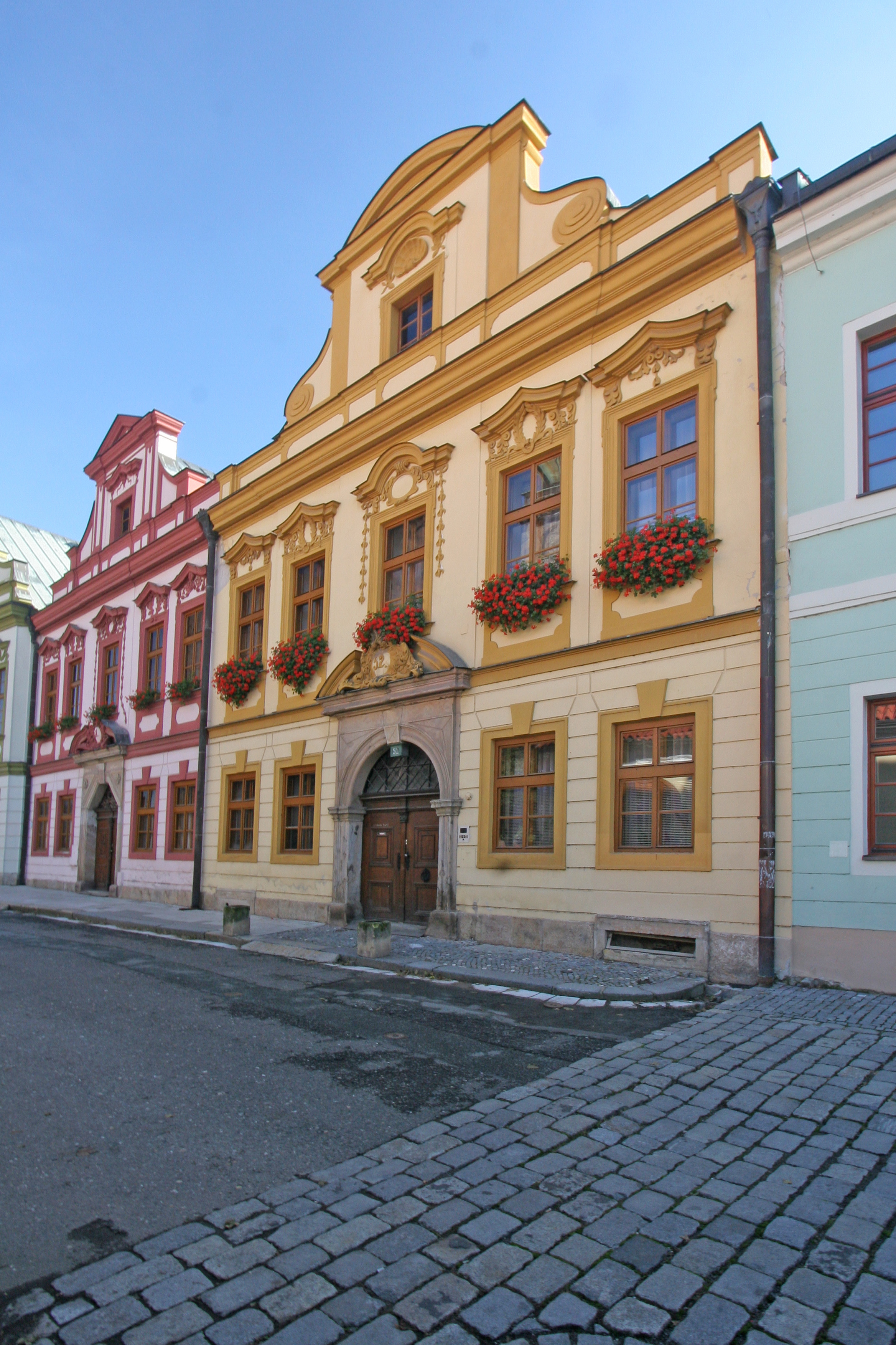 Kanovnický dům (Hradec Králové), nám. Jana Pavla II. 52, Hradec Králové